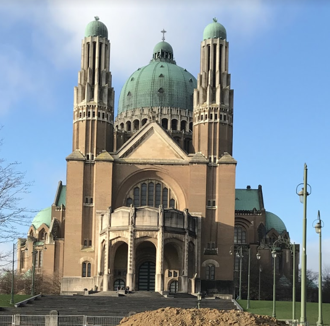 Basilique de koekelberg